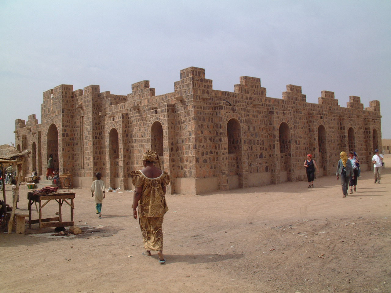 Auteur : Utilisateur:Taguelmoust Kidal(Mali), La maison des artisans. Utilisateur:Taguelmoust janvier 2005